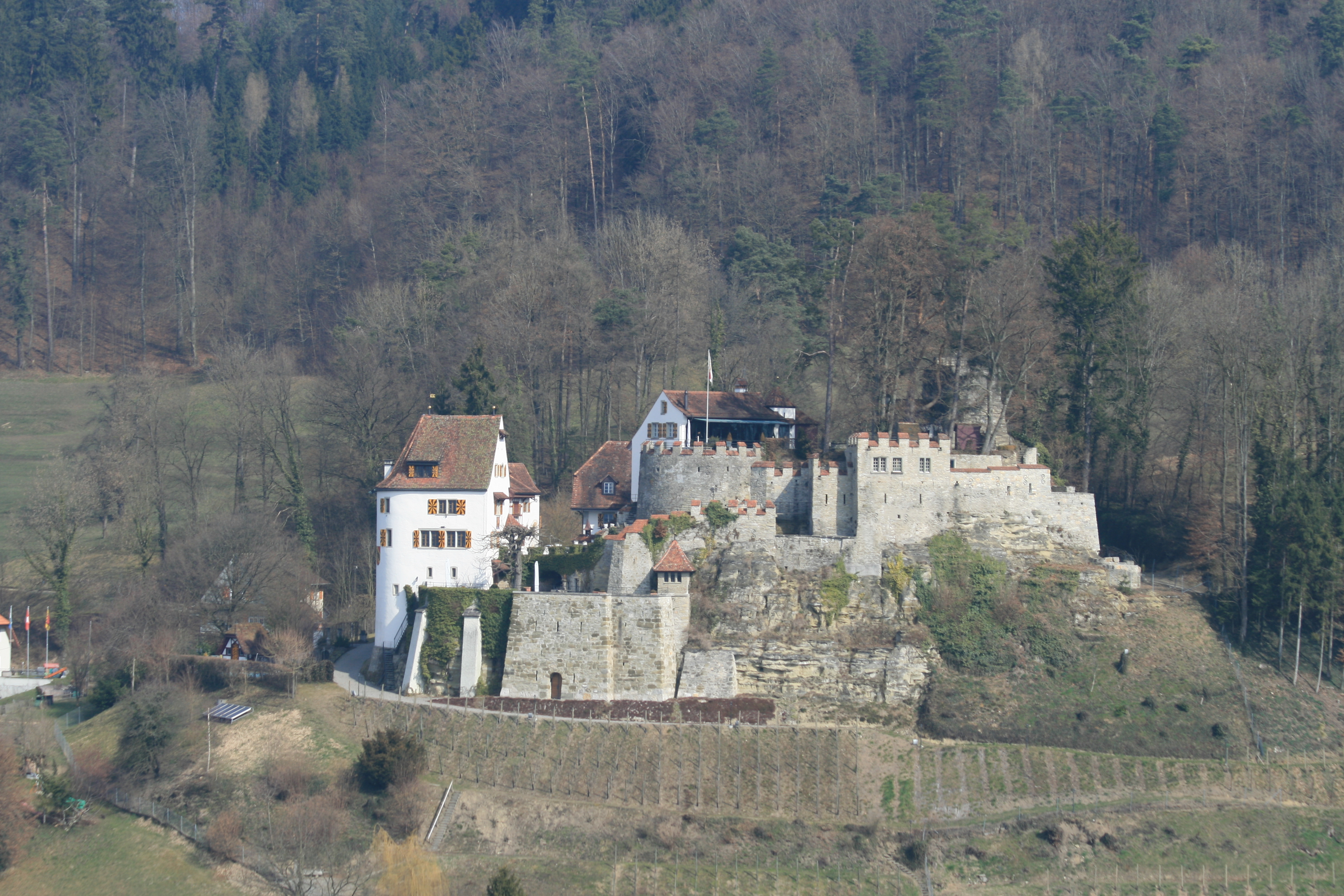 Trostburg in Teufenthal